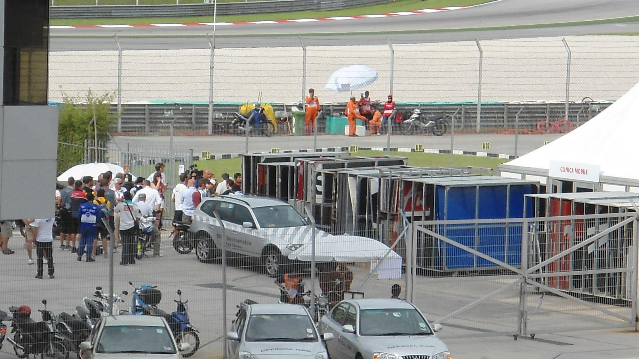 Suasana klinik sirkuit setelah kecelakaan Marco Simoncelli.